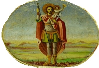 Фреска над вратата во манастирската црква „Св. Христофор“ во битолски Крстоар